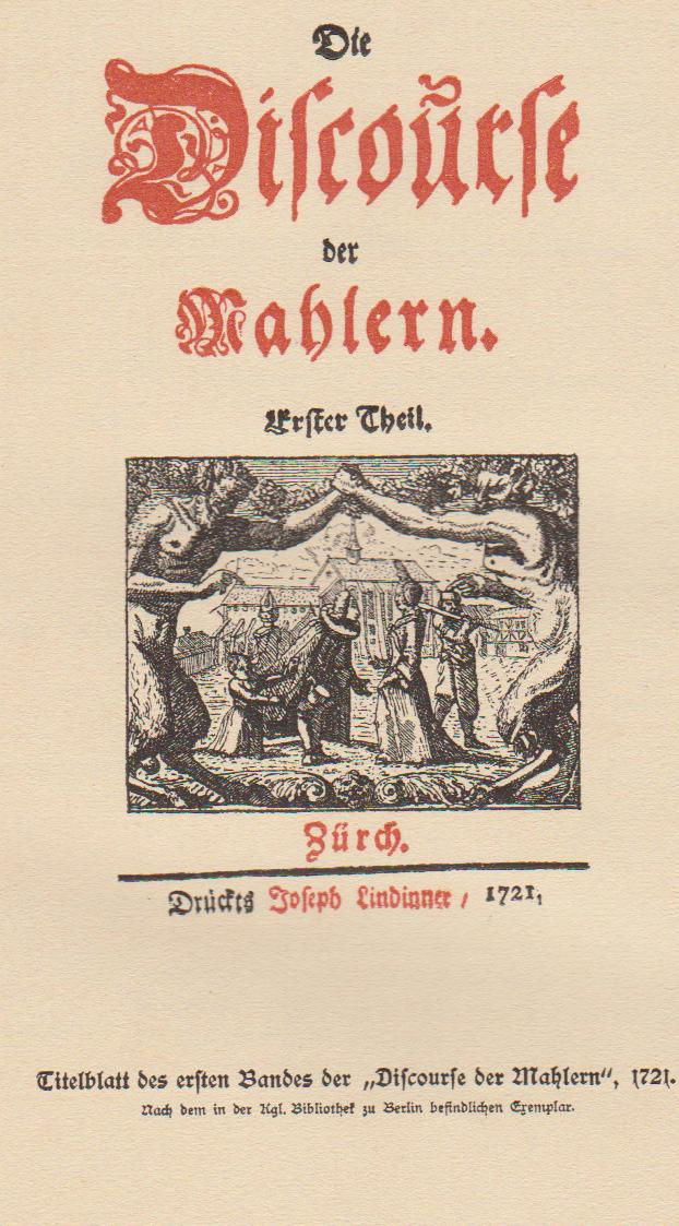 Die Discourse der Mahlern von Johann Jakob Bodmer und Johann Jakob Breitling